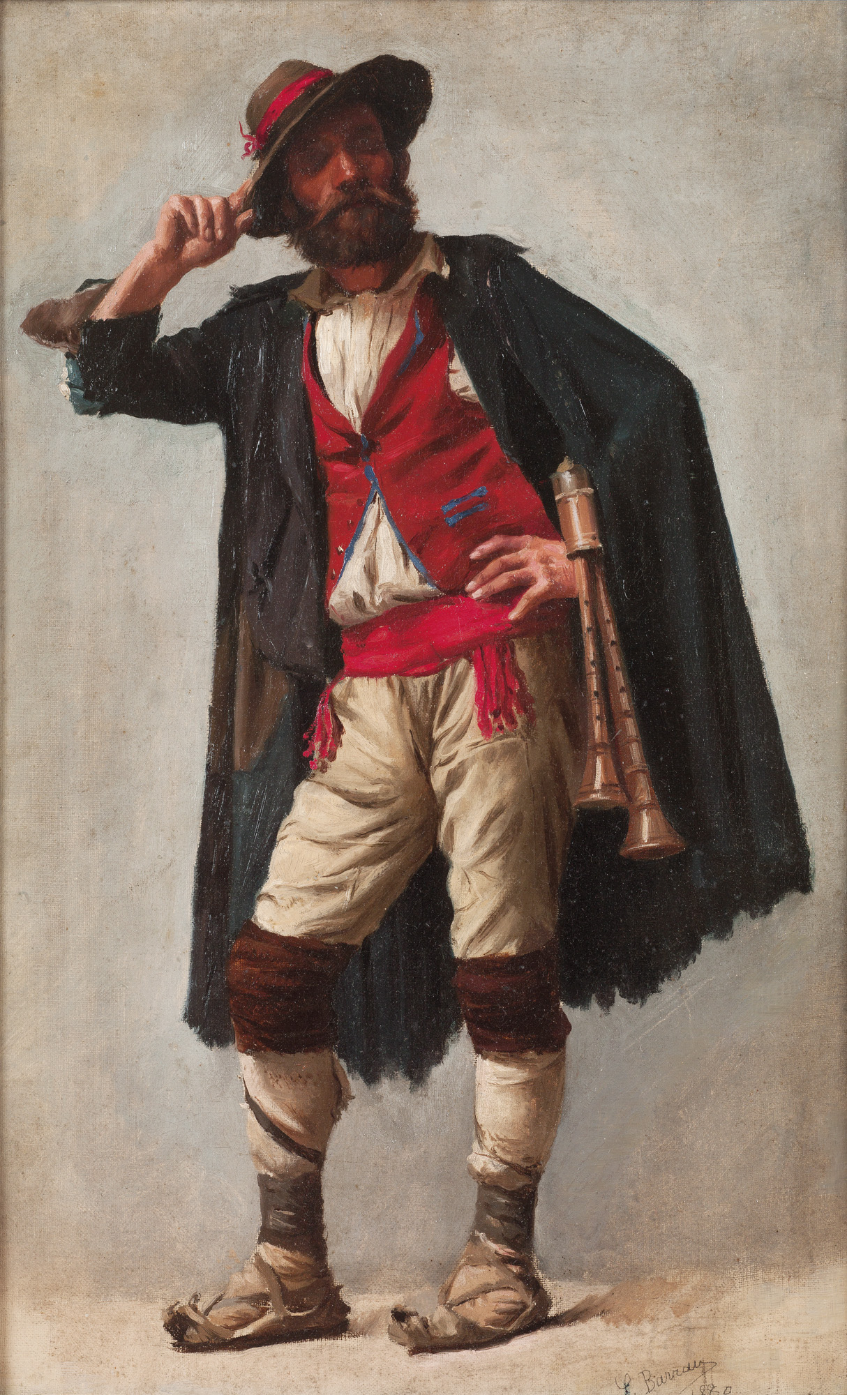 Retrat d'un músic ambulant del segle XIX